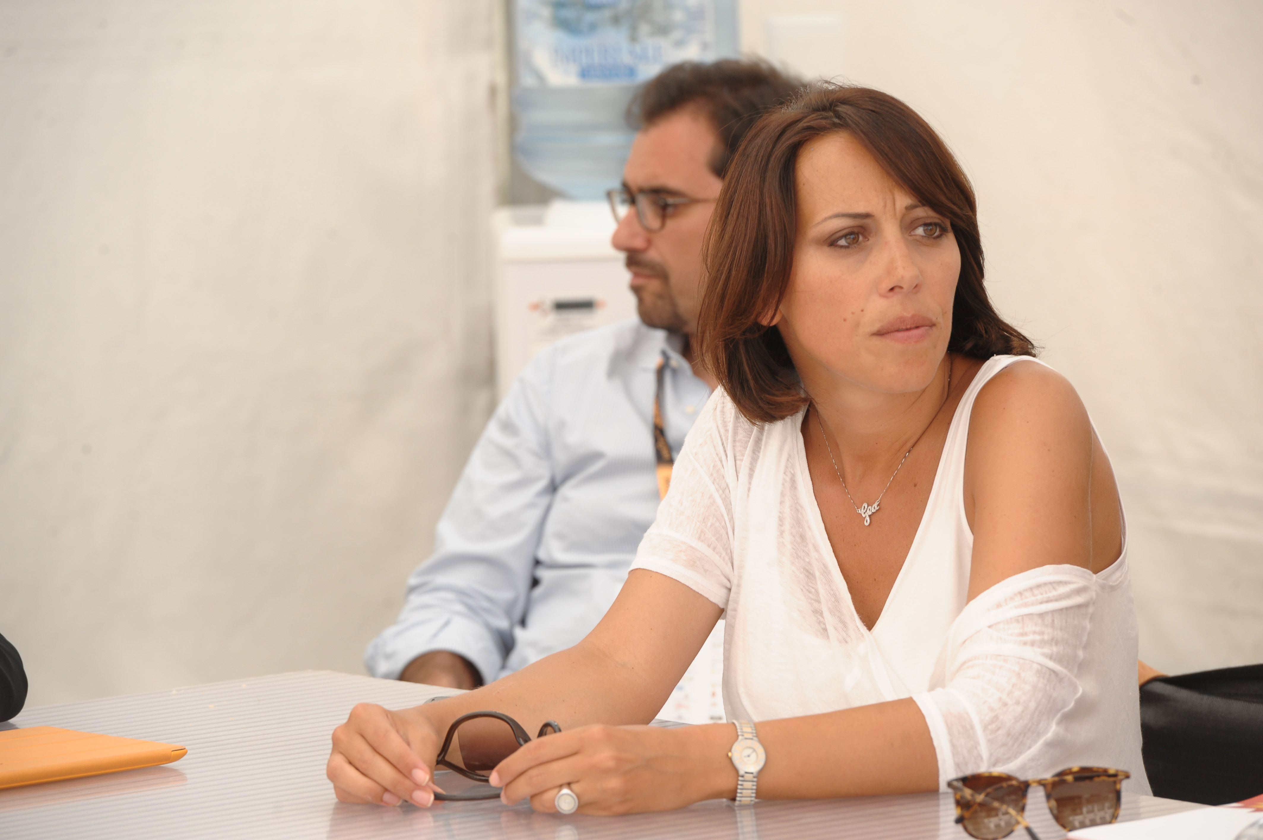 Nunzia De Girolamo a veDrò 2012.